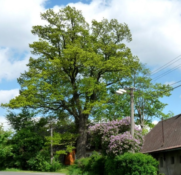 Bezděkovský dub